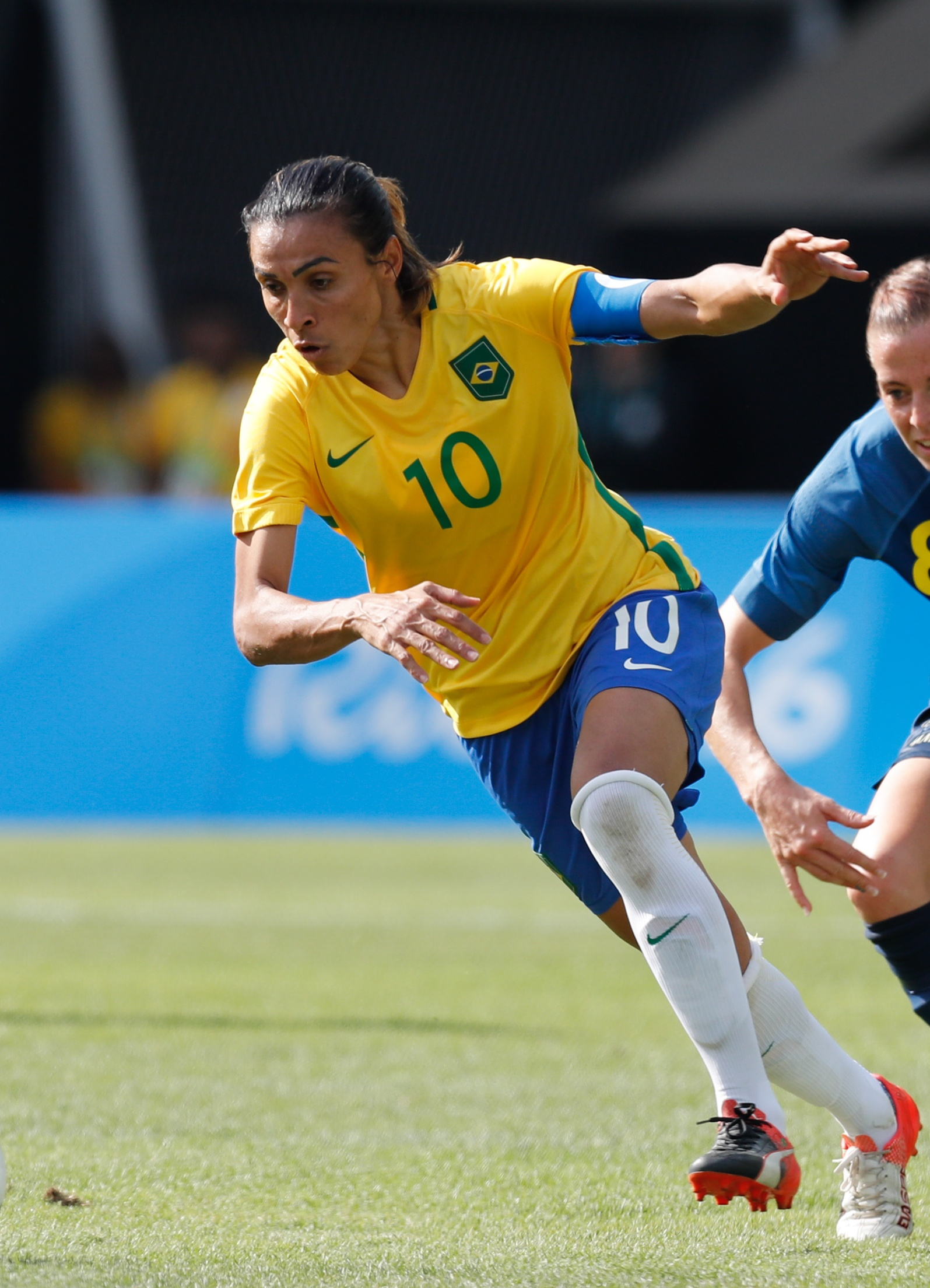 Rio de Janeiro - Seleção brasileira de futebol feminino disputa semifinal com a Suécia, no Maracanã. O Brasil perde nos pênaltis e vai disputar o bronze (Fernando Frazão/Agência Brasil)